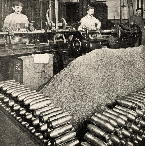 Zaandam, Nederland. De Rijks Artillerie-Inrichtingen (Staatsbedrijf der Artillerie-Inrichtingen) aan de Hembrug. In de granaten fabriek: Het afdraaien van Marine granaten van 7 1/2 cm doorsnede voor de oorlogsschepen. Werklieden aan de draaibank bezig met het afdraaien. De grote hoop is ijzervijlsel afkomstig van afgewerkte granaten. 1912.